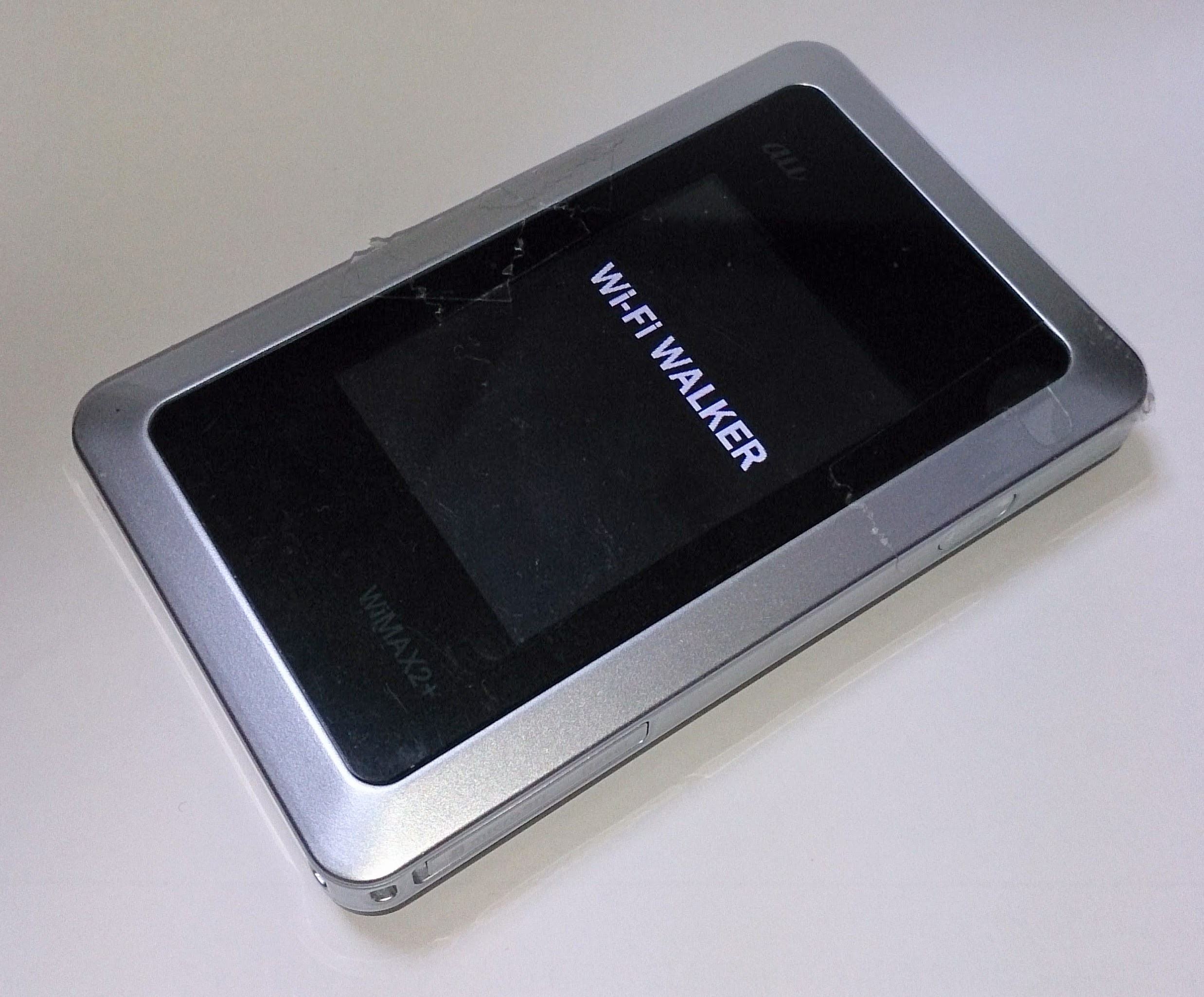 HWD14・シルバー